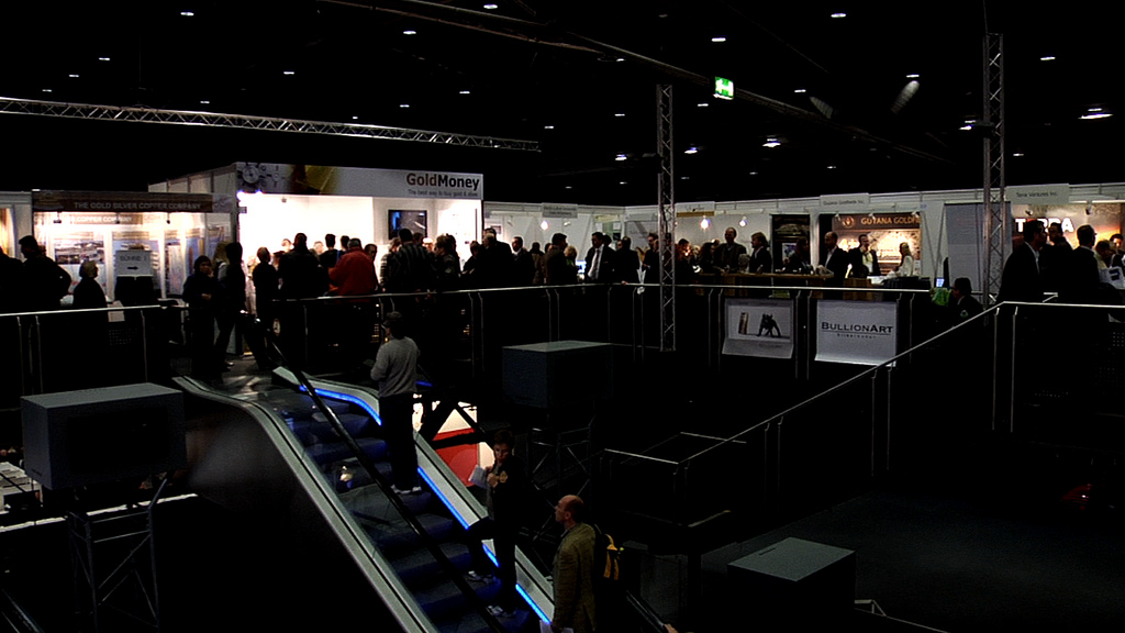 Internationale Edelmetall- und Rohstoffmesse 2009 in der Event-Arena, Olympiapark München